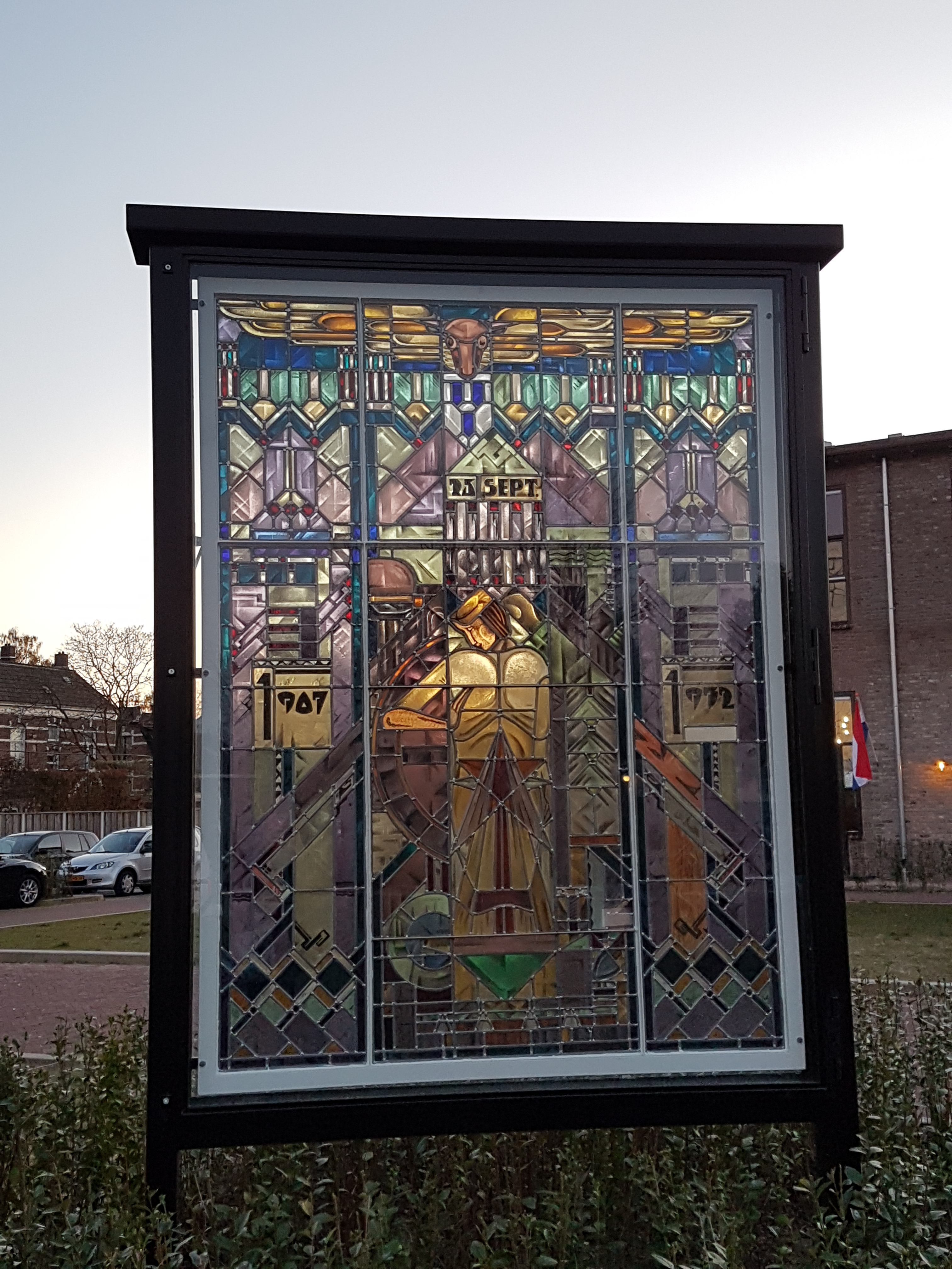 Het glas-in-lood raam uit 1932 was een geschenk aan de Winterswijkse Technische School ter ere van hun 25-jarig bestaan.